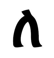 лави амхар